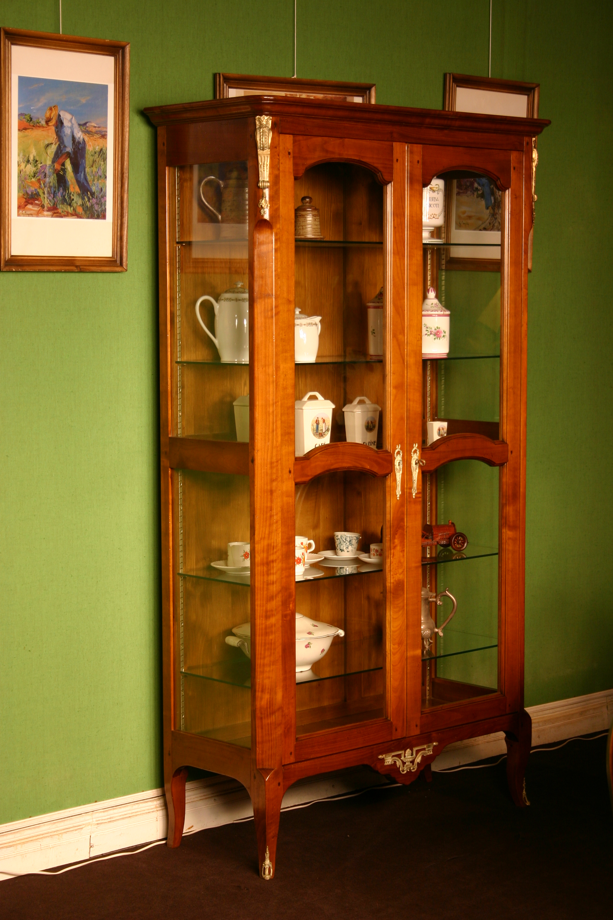 Argentier 'Maurepas' de style Transition, réplique d'époque, en 2 portes, réalisée par les Ateliers Allot Frères.